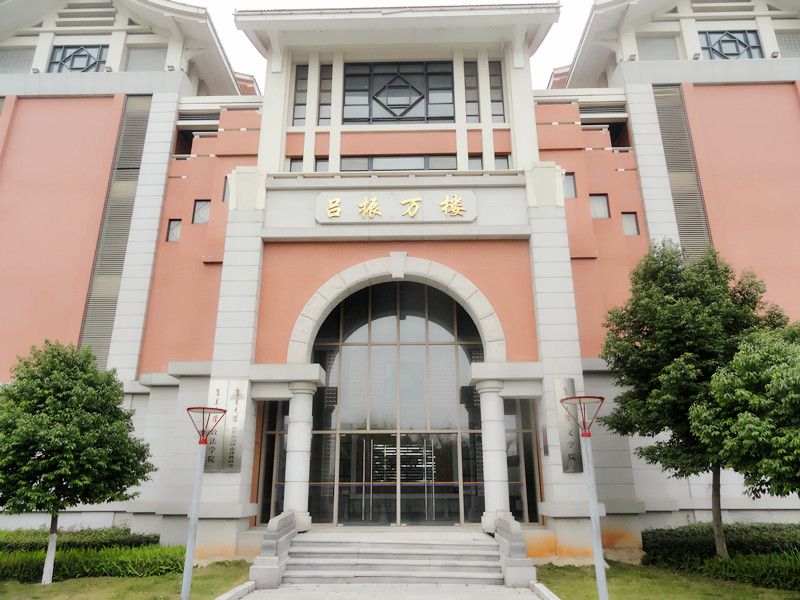 2013年拍摄的集美大学政法学院及文学院楼吕正万楼